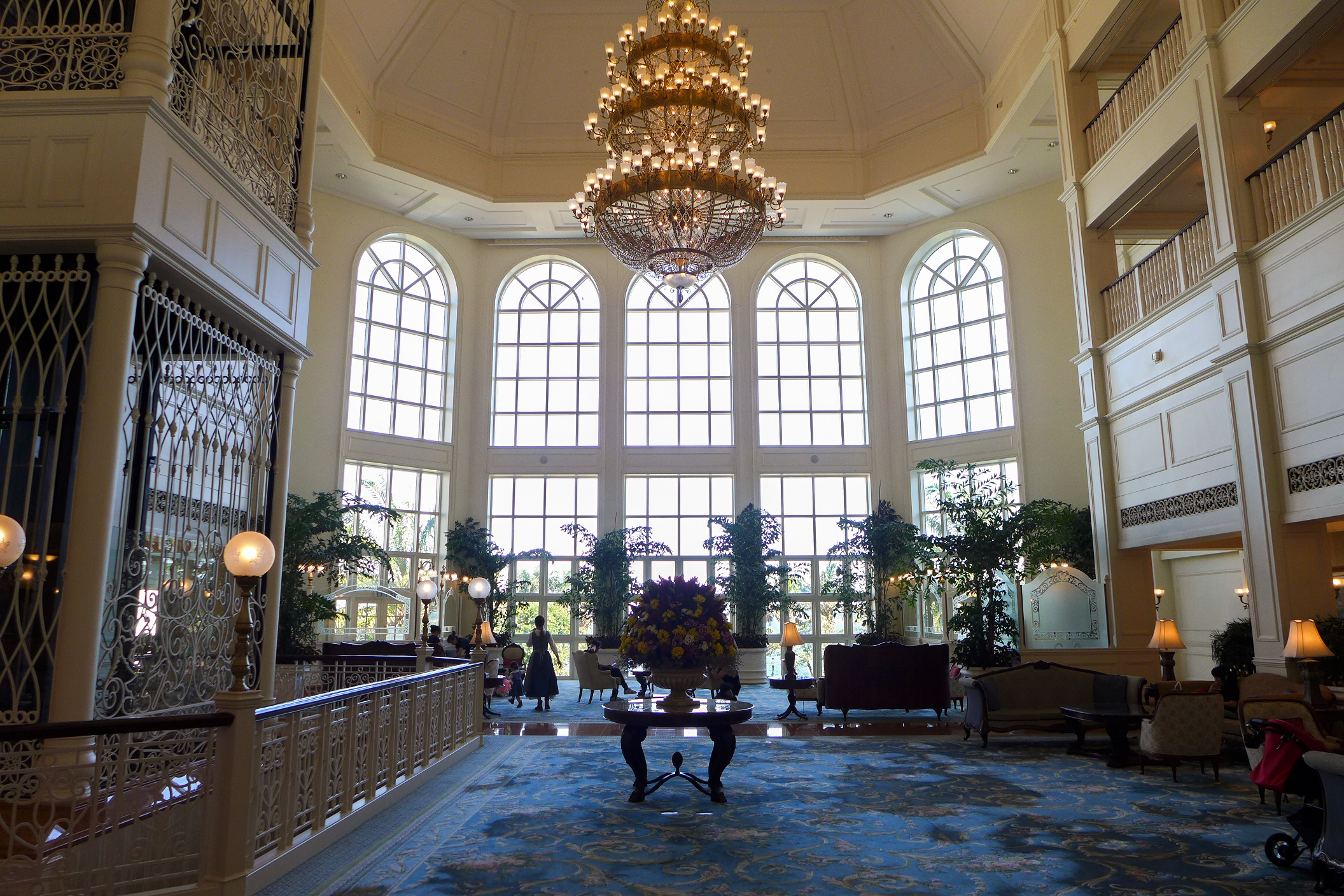 Hong Kong Disneyland Hotel